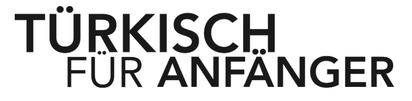 Türkisch für Anfänger (Film) movie logo